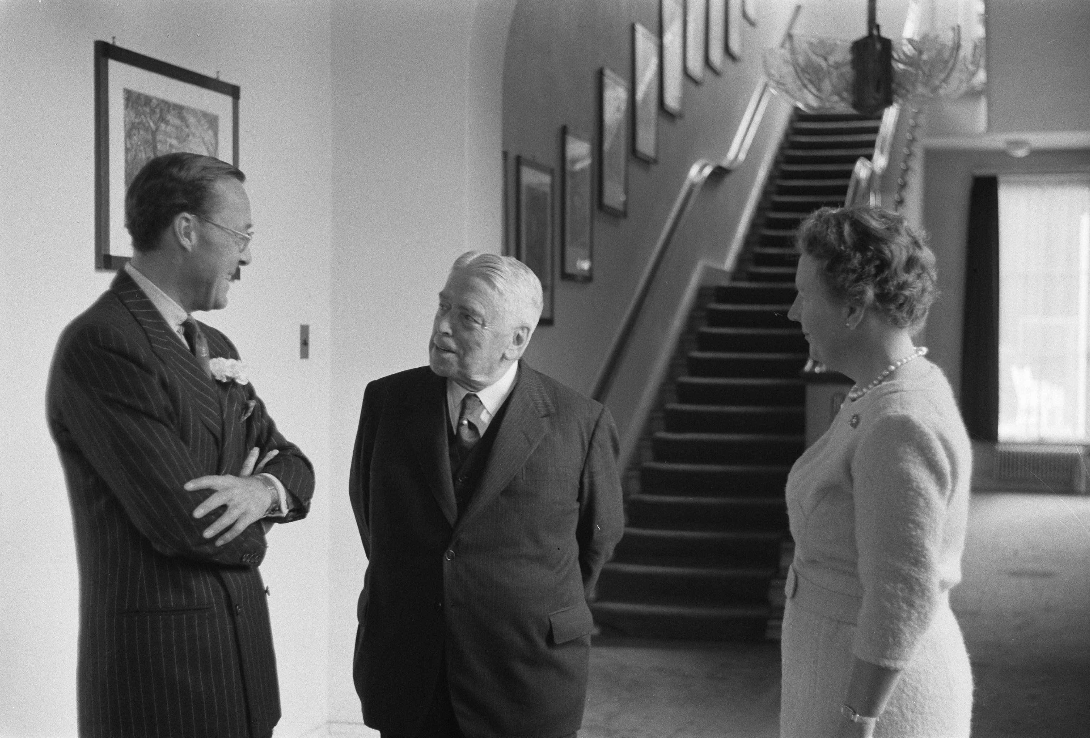 Collectie / Archief : Fotocollectie Anefo Reportage / Serie : Koningin Juliana en prins Bernhard ontvangen premier Walter Nash van Nieuw-Zeeland voor de lunch op paleis Soestdijk Beschrijving : V.l.n.r. prins Bernhard, premier Nash en koningin Juliana Datum : 19 mei 1960 Trefwoorden : groepsportretten, koninginnen, ministers-presidenten, paleizen, prinsen Persoonsnaam : Bernhard (prins Nederland), Juliana (koningin Nederland), Nash, Walter Fotograaf : Fotograaf Onbekend / Anefo, [onbekend] Auteursrechthebbende : Nationaal Archief Materiaalsoort : Negatief (zwart/wit) Nummer archiefinventaris : bekijk toegang 2.24.01.05 Bestanddeelnummer : 911-2690